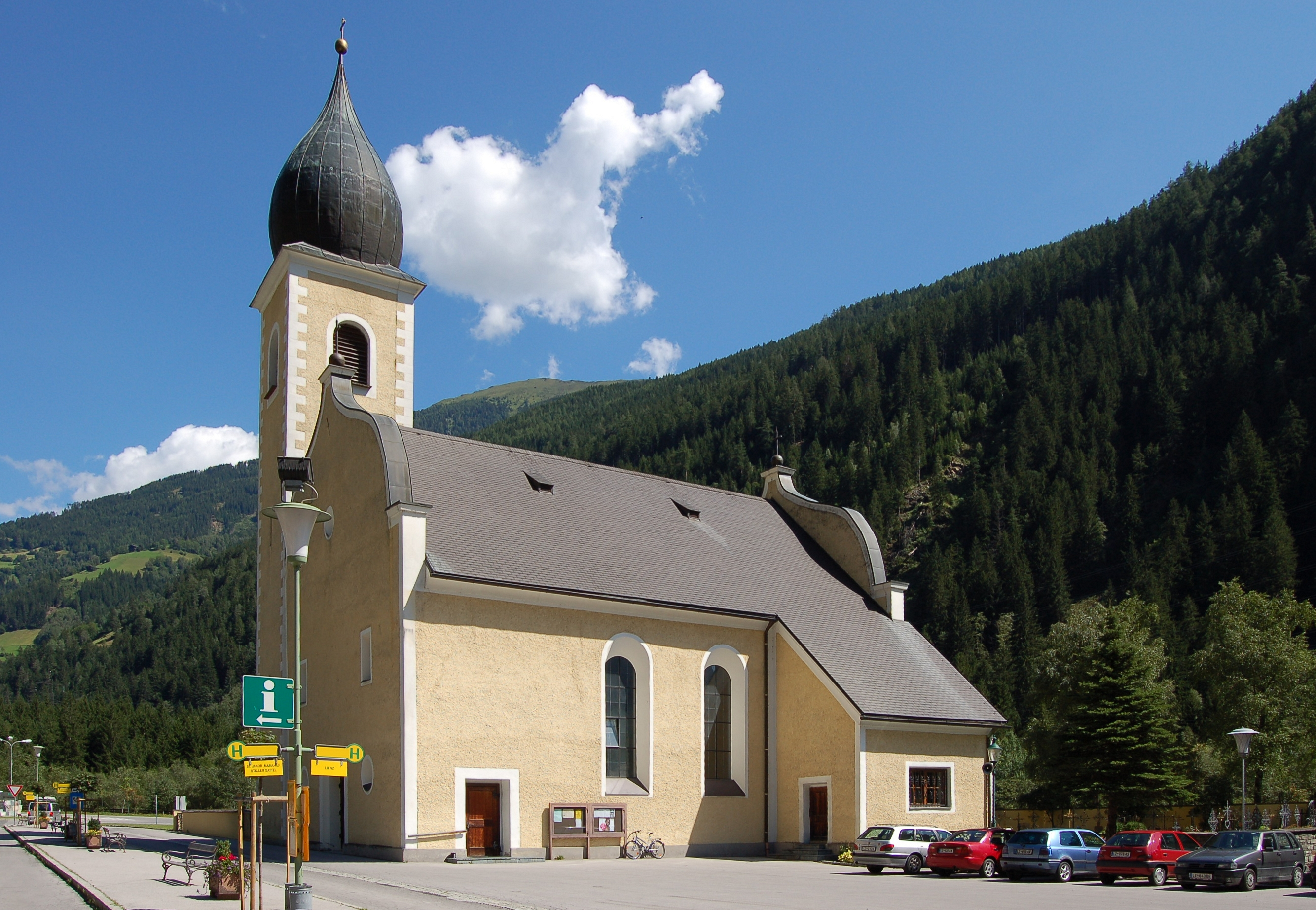 Die denkmalgeschützte Filialkirche Huben in der Fraktion Huben in Matrei in Osttirol.